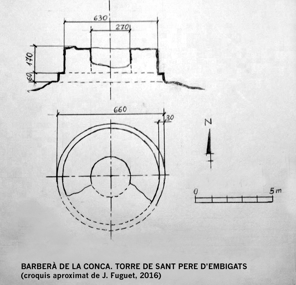 Barberà de la Conca. Torre de Sant Pere d'Embigats. (Croquis acotat realitzat l'any 2016).